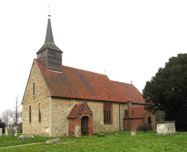 St Germans, Faulkbourne, Essex